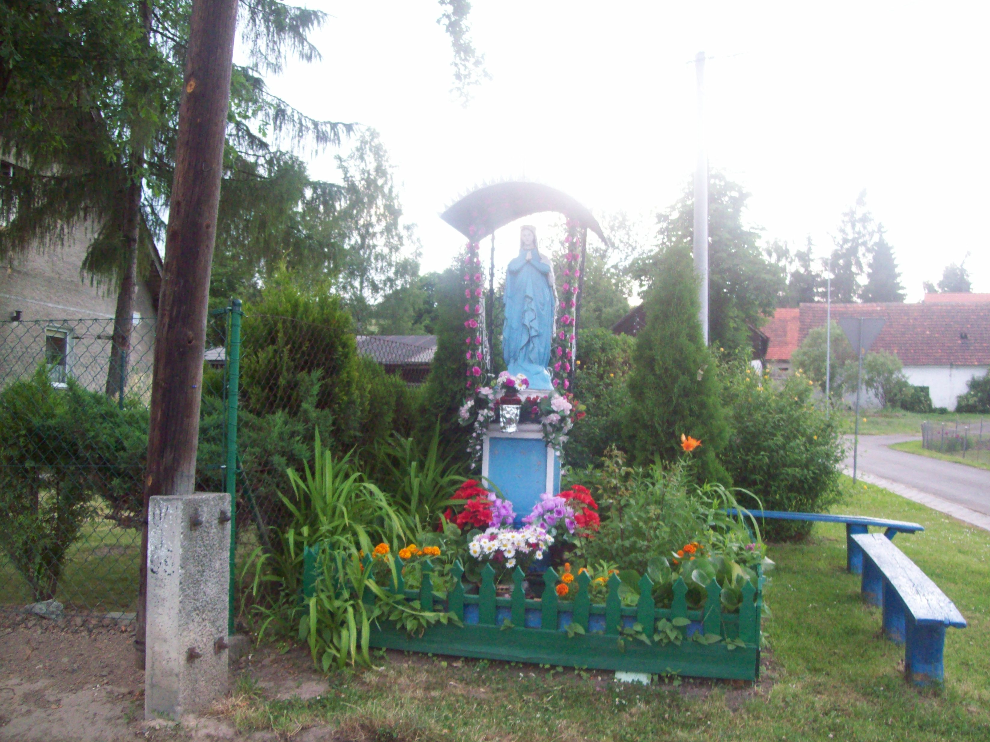 Figurka Matki Bożej w Ścinawicy